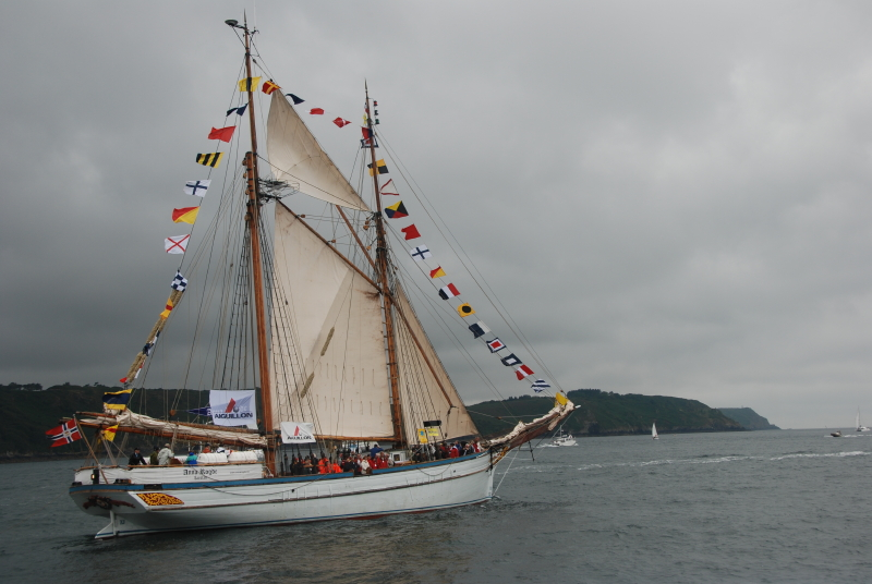 La goélette Anna Rodge Brest 2008